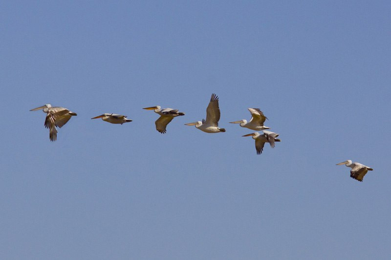 Кудрявые пеликаны на озере Курлады (Челябинская область)